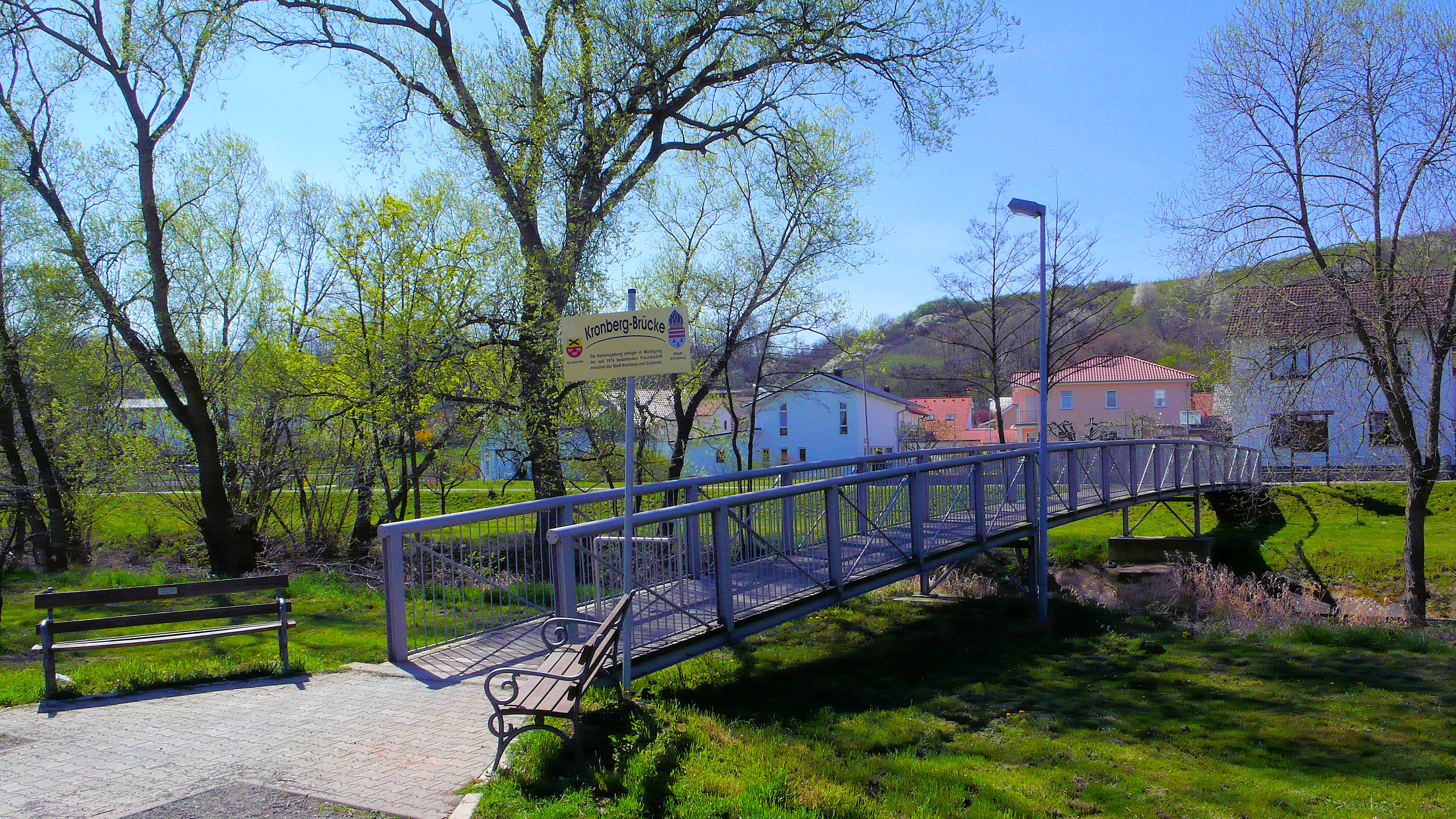 Kronberg Brücke in Guldental